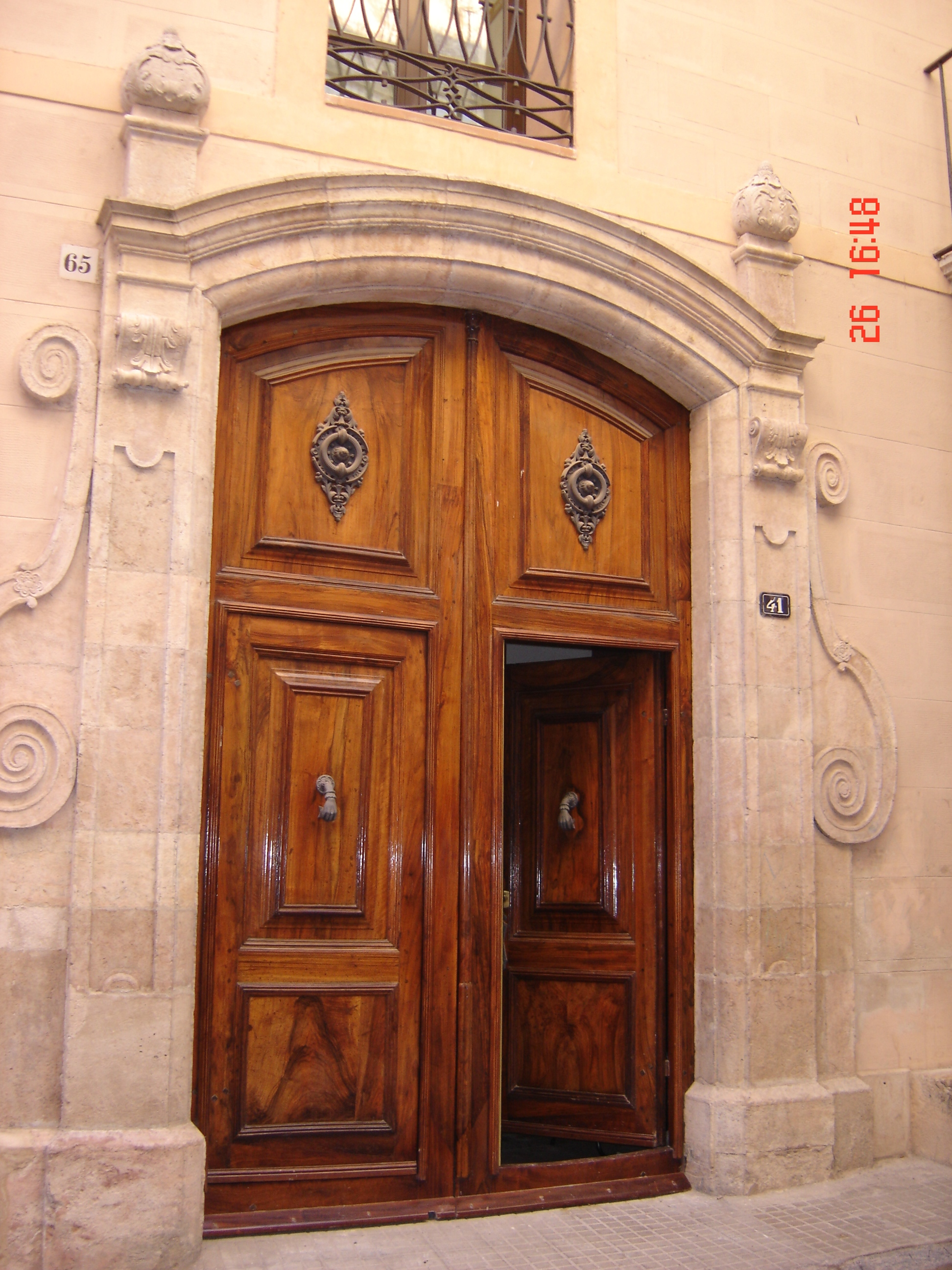 Porta Principal de Can Magriñà de Falset, ara l'edfici és la Biblioteca Pública Salvador Estrem i Fa